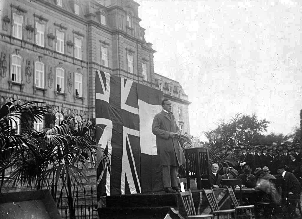 Le ministre Athanase David devant l'édifice du parlement, à Québec, à l'occasion du dévoilement d'une statue en l'honneur de La Vérendrye.On voit les deux drapeaux utilisés, comme le voulait la coutume lors des cérémonies de l'époque, pour représenter deux composantes nationales de la population : le drapeau du Royaume-Uni comme symbole de la population d'origine anglo-britannique et le drapeau de la France comme symbole de la population d'origine canadienne-française.